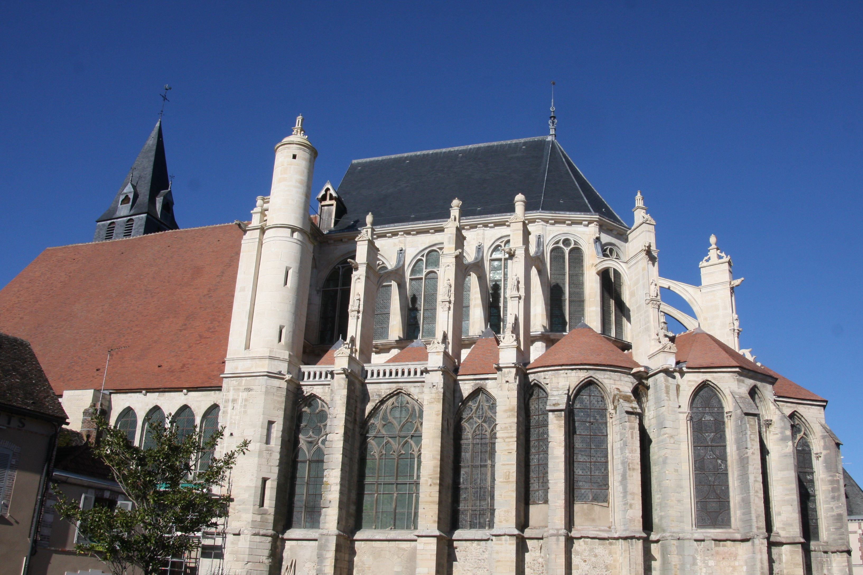 après d'importants travaux de rénovation